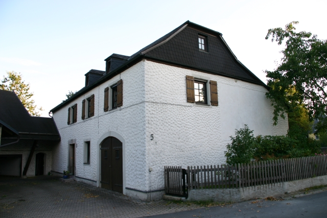 Obersteben